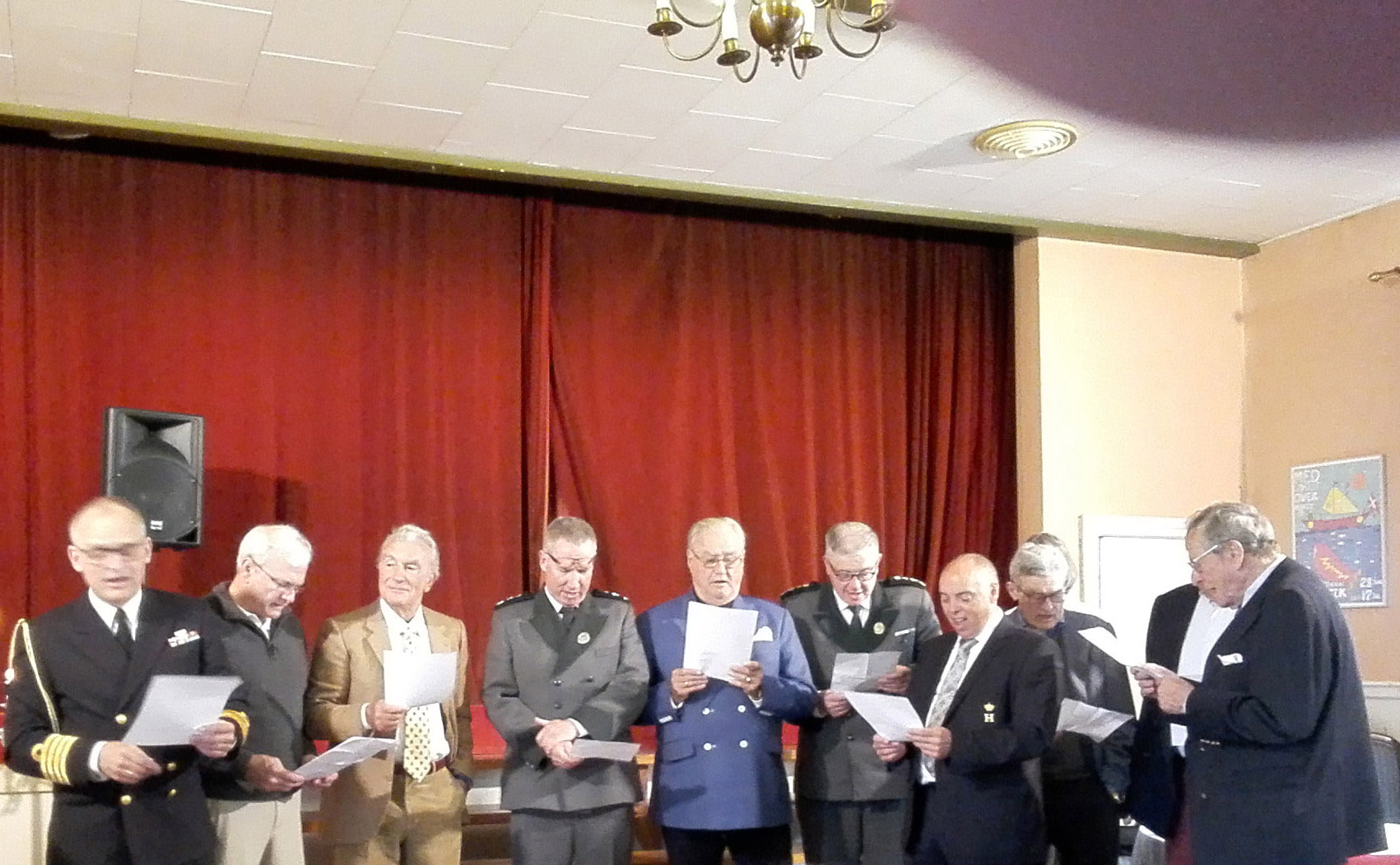 Dannebrogs Jægerkor med Prins Henrik i spidsen for sine jagtkammerater og cheferne for Dannebrog og Naturstyrelsen Bornholm ved indvielsen af Knud Rasmussens Festsal I Østermarie